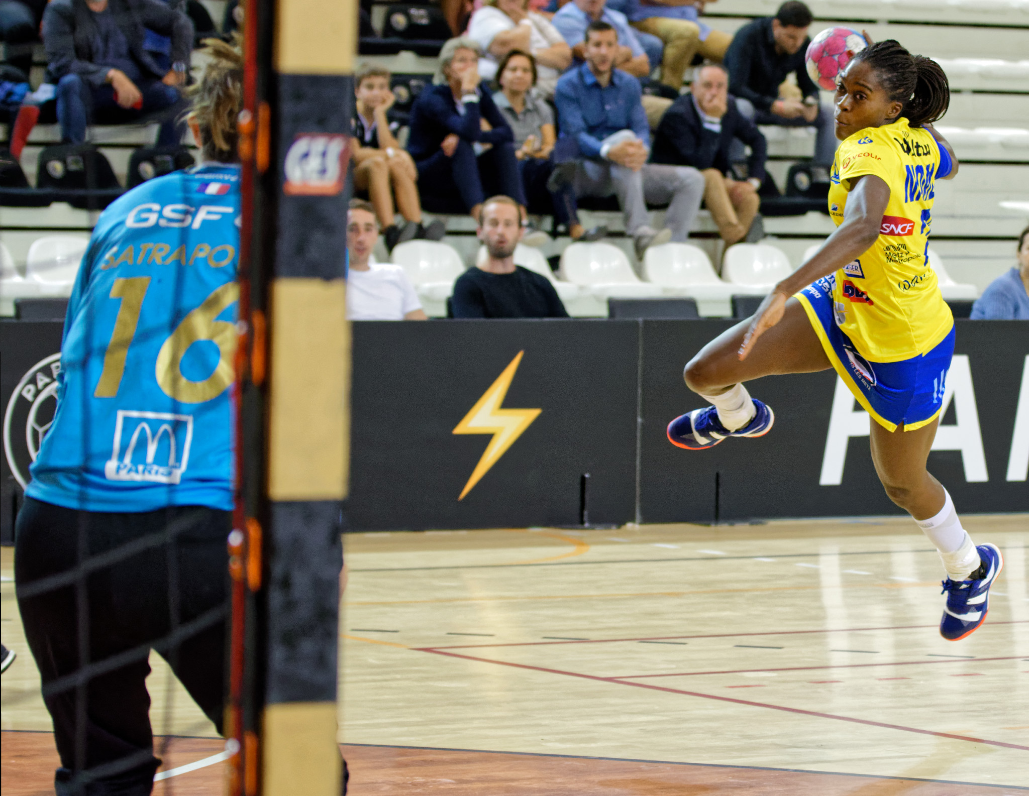 Rencontre de la 5e journée de la LFH entre Paris 92 et Metz Handball. A Issy-Les-Moulineaux, le 16 septembre 2018.